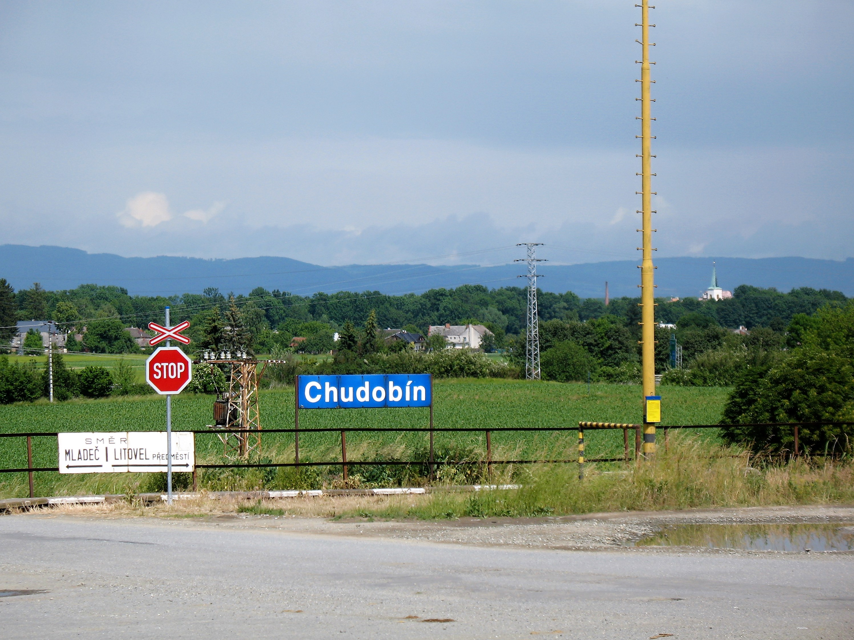 Zastávka Chudobín (trať Litovel - Mladeč) se nachází na katastru Sobáčova